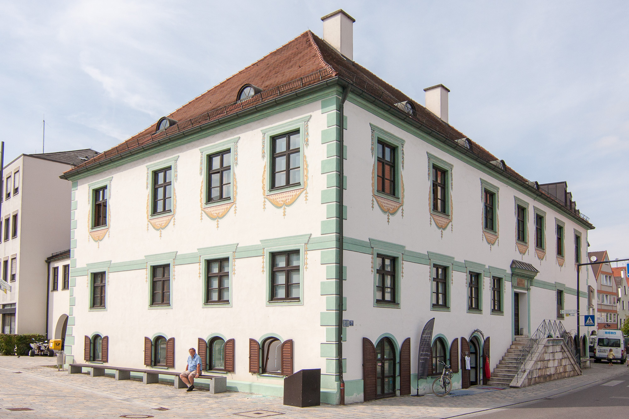 Ehem. Rentamt; im Kern spätmittelalterlich, Freitreppe 1845, Walmdach 1853, freigelegte Fassadenmalerei um 1800.This is a photograph of an architectural monument.